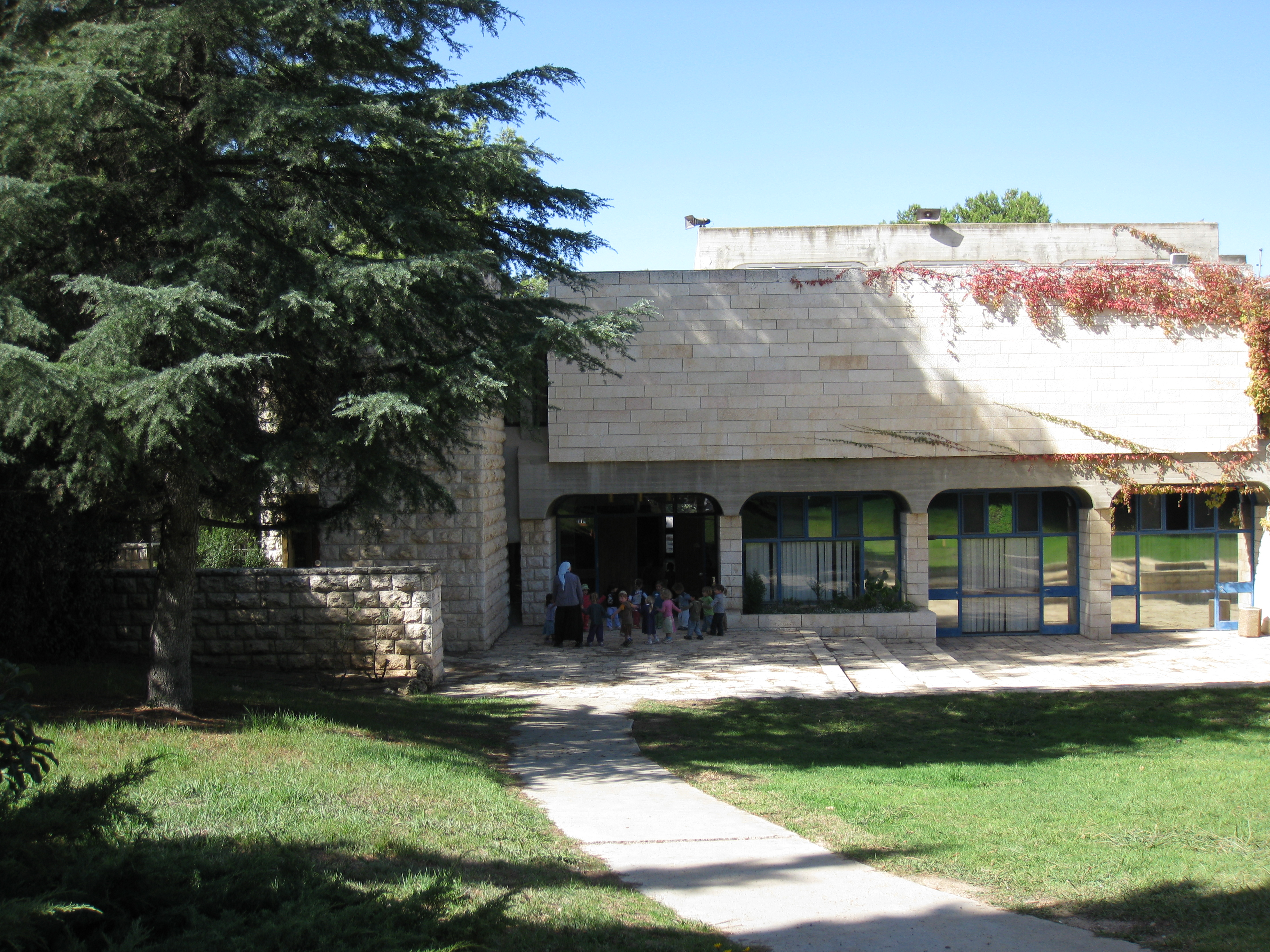 Kfar Etzion Synagogue בית הכנסת של כפר עציון